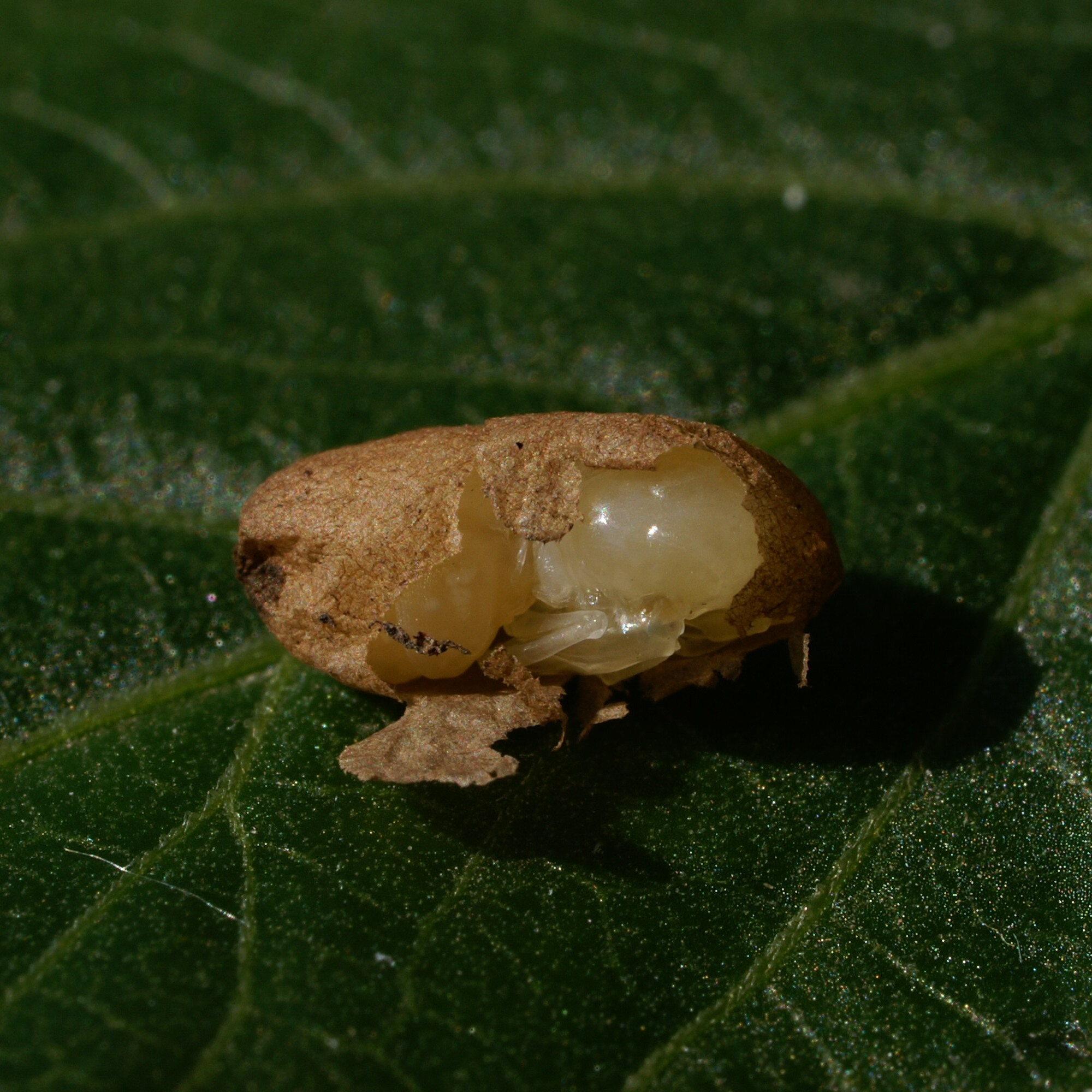 Im Puppenstadium nimmt die Ameise (Formicidae) keine Nahrung mehr auf und verharrt völlig regungslos. Die Larven der meisten Schuppen- und Urameisen spinnen sich beim Verpuppen mittels eines aus ihrem Labium austretenden Spinndrüsensekretes in eine trockene Hülle ( Kokon ) ein.